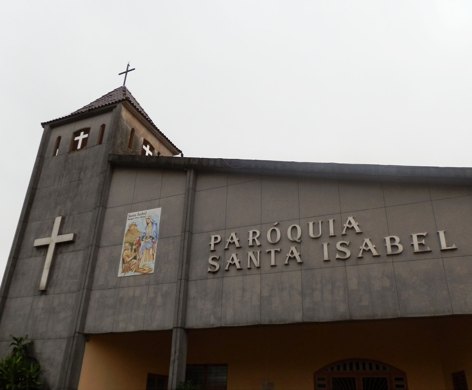 Paróquia localizada na Avenida Liberdade: a maior avenida do bairro Santa Isabel, em Viamão.